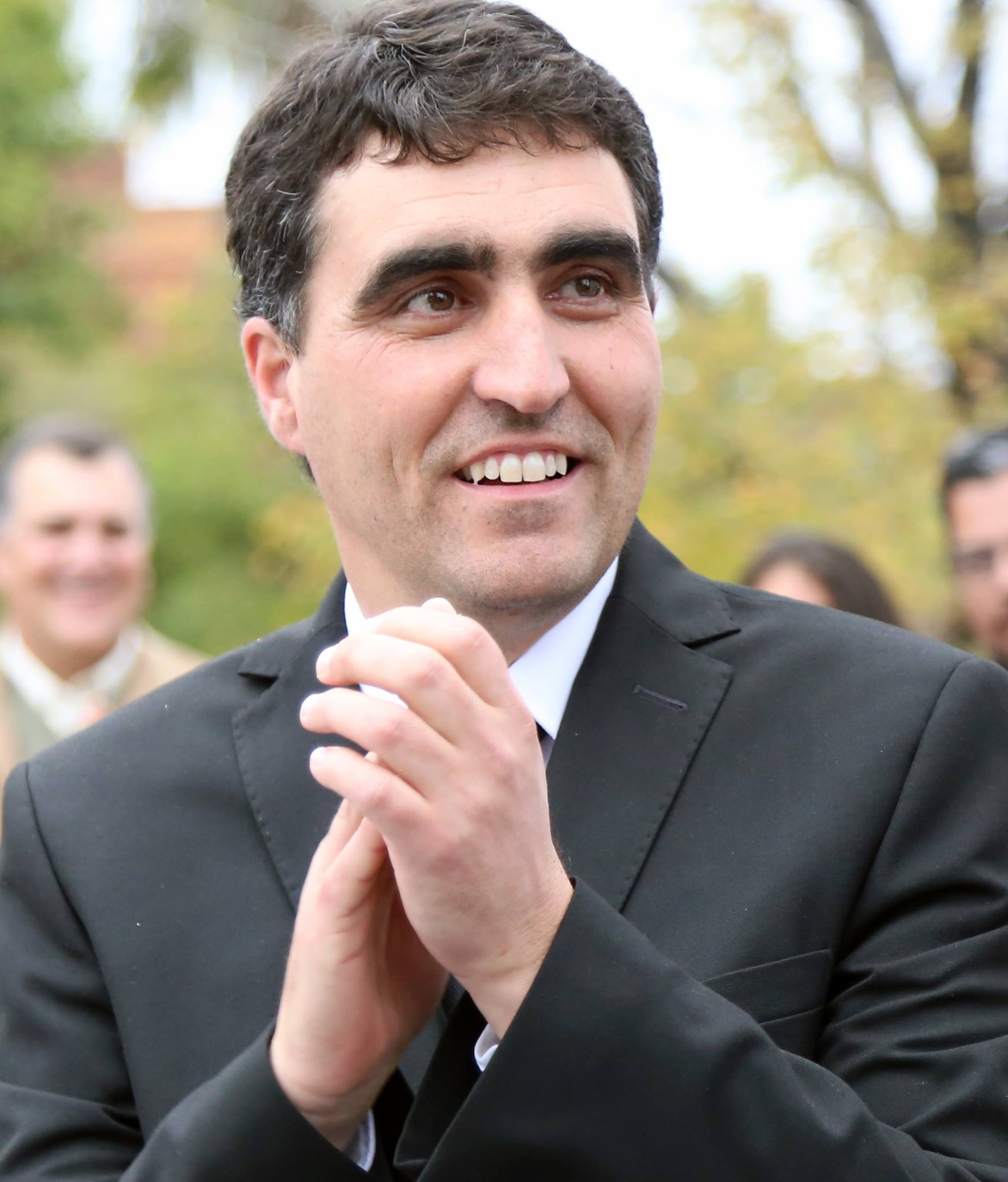 Día de asunción del cargo como Intendente de Salto. 9 de Julio de 2015.